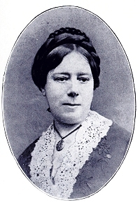 Catherine Winkworth (*13. September 1827 in Holborn / London, † 1. Juli 1878 nahe Genf) war eine englische Übersetzerin. Am bekanntesten ist sie für ihre Leistung, die deutsche Choraltradition englischen Muttersprachlern durch ihre zahlreichen Übersetzungen von Kirchenliedern nahegebracht zu haben.